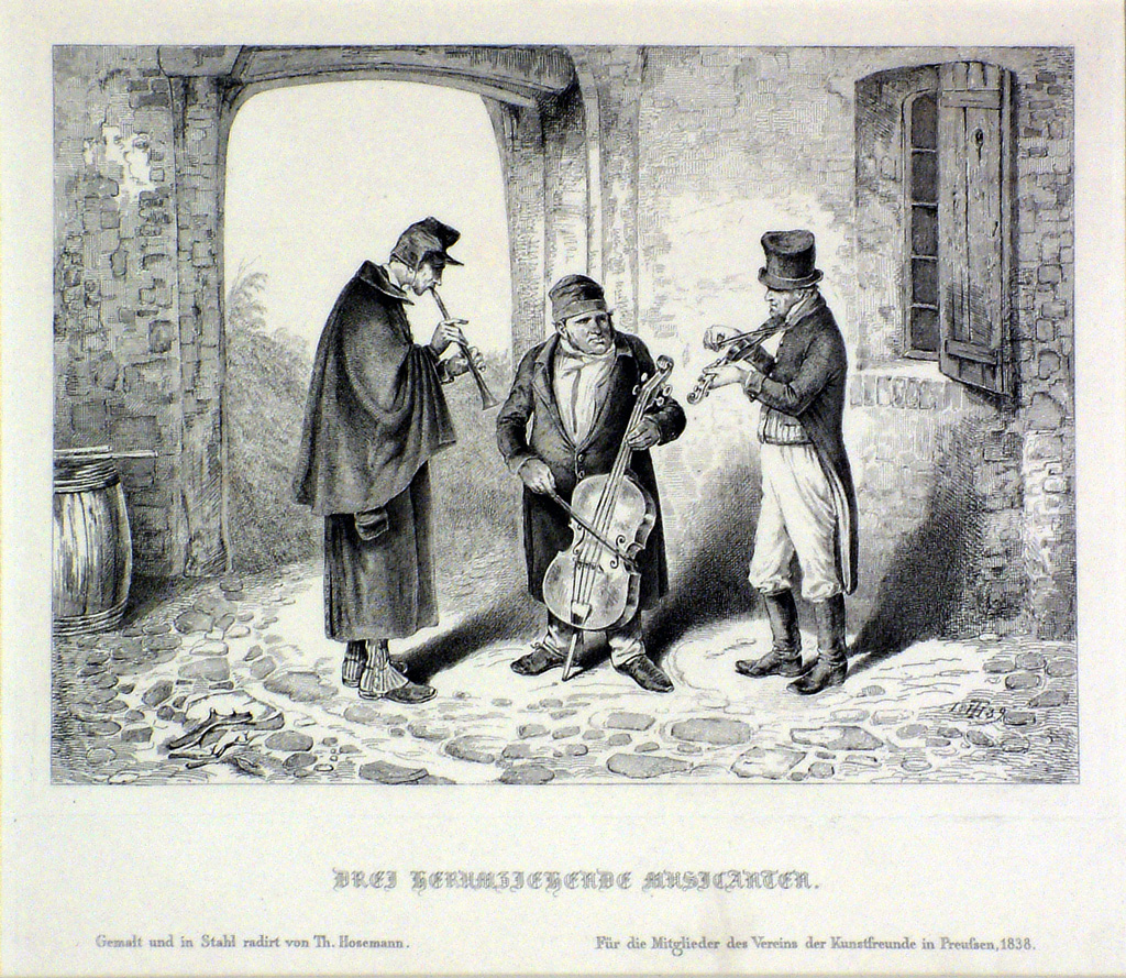 Foto von "Drei Herumziehende Musikanten", Stahlstich von Theodor Hosemann 1838